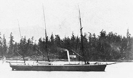 HMS Forward